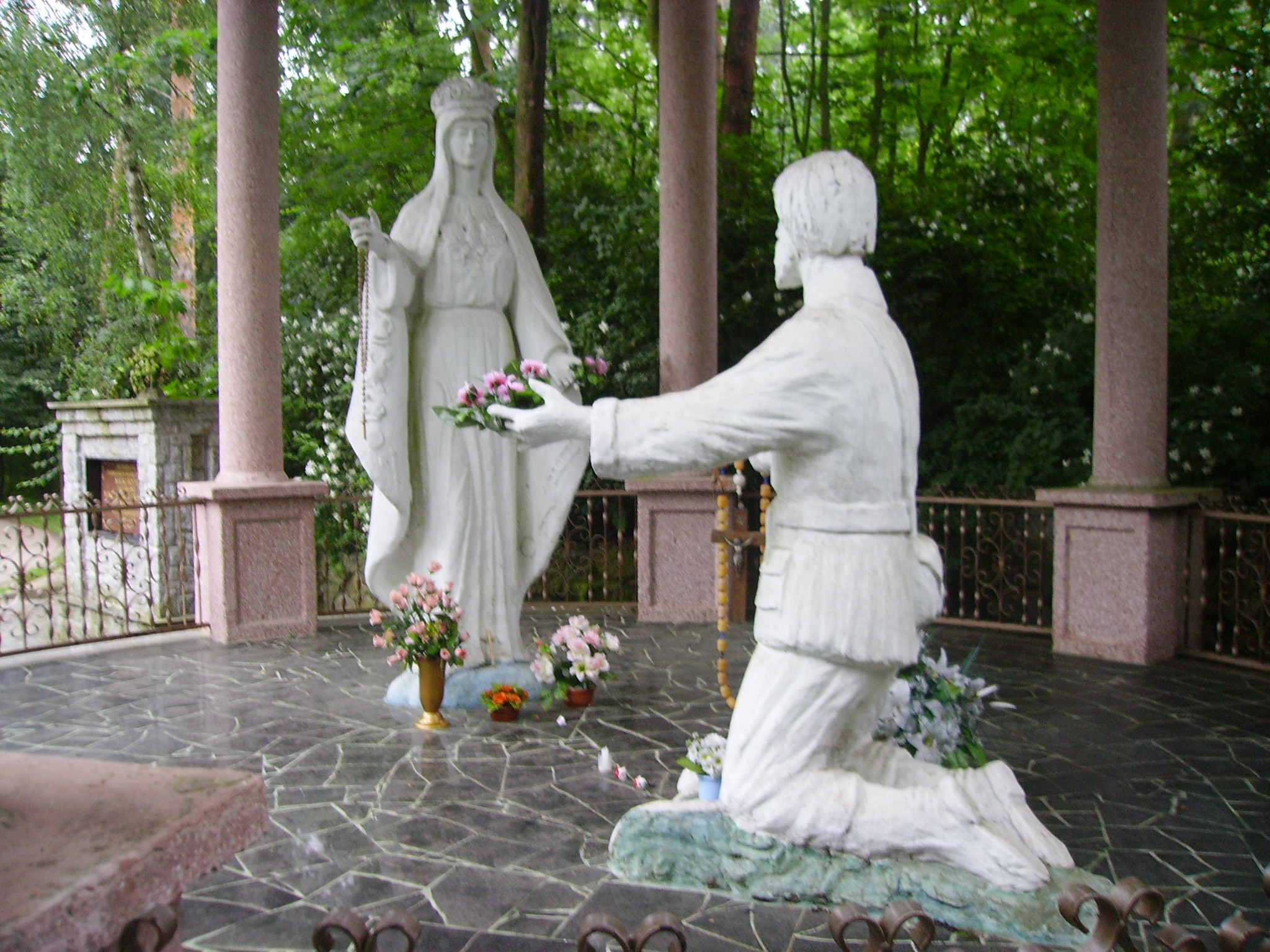 Las Grąbliński. Kaplica, rzeźba